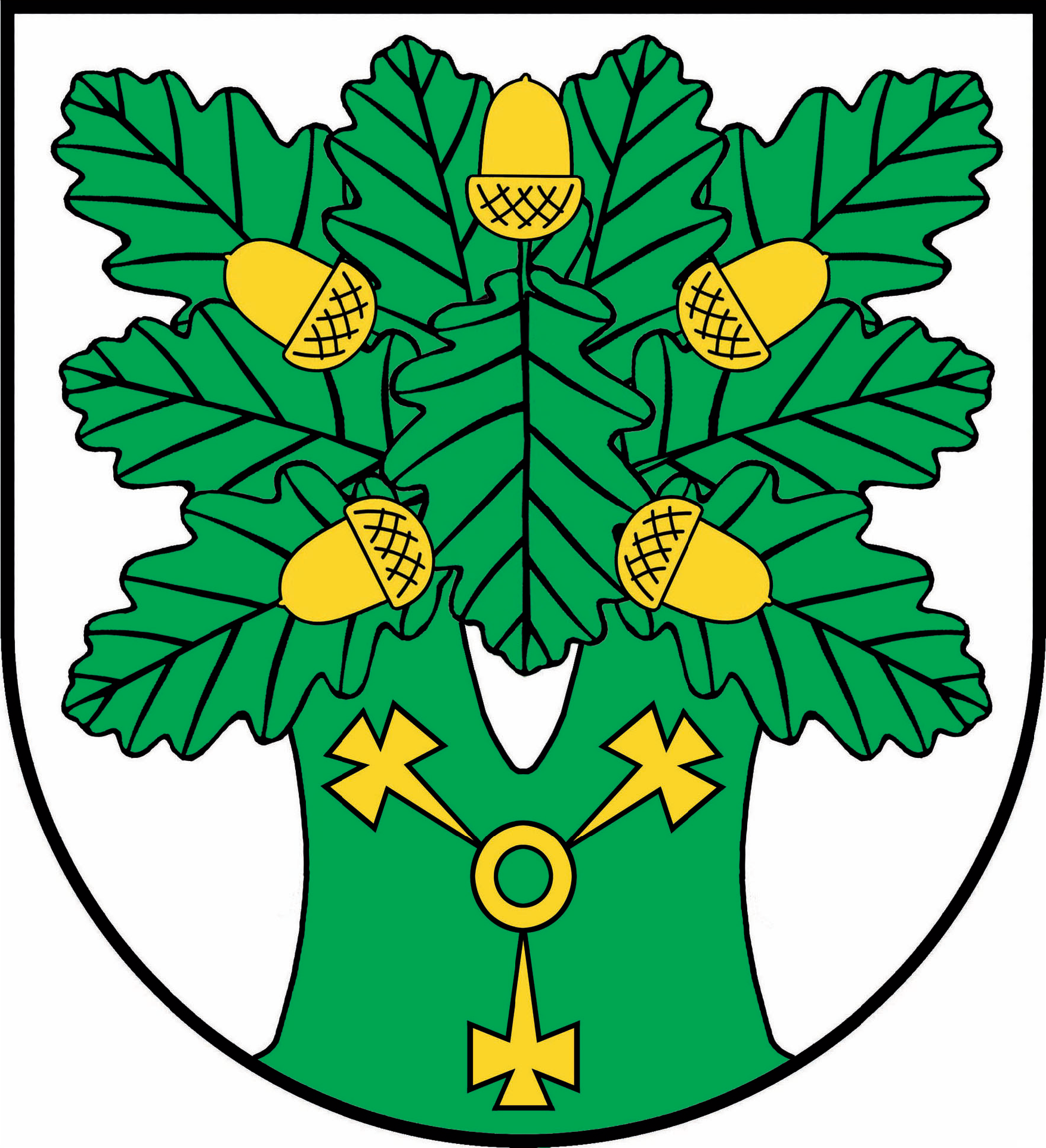 Herb gminy Ojrzeń